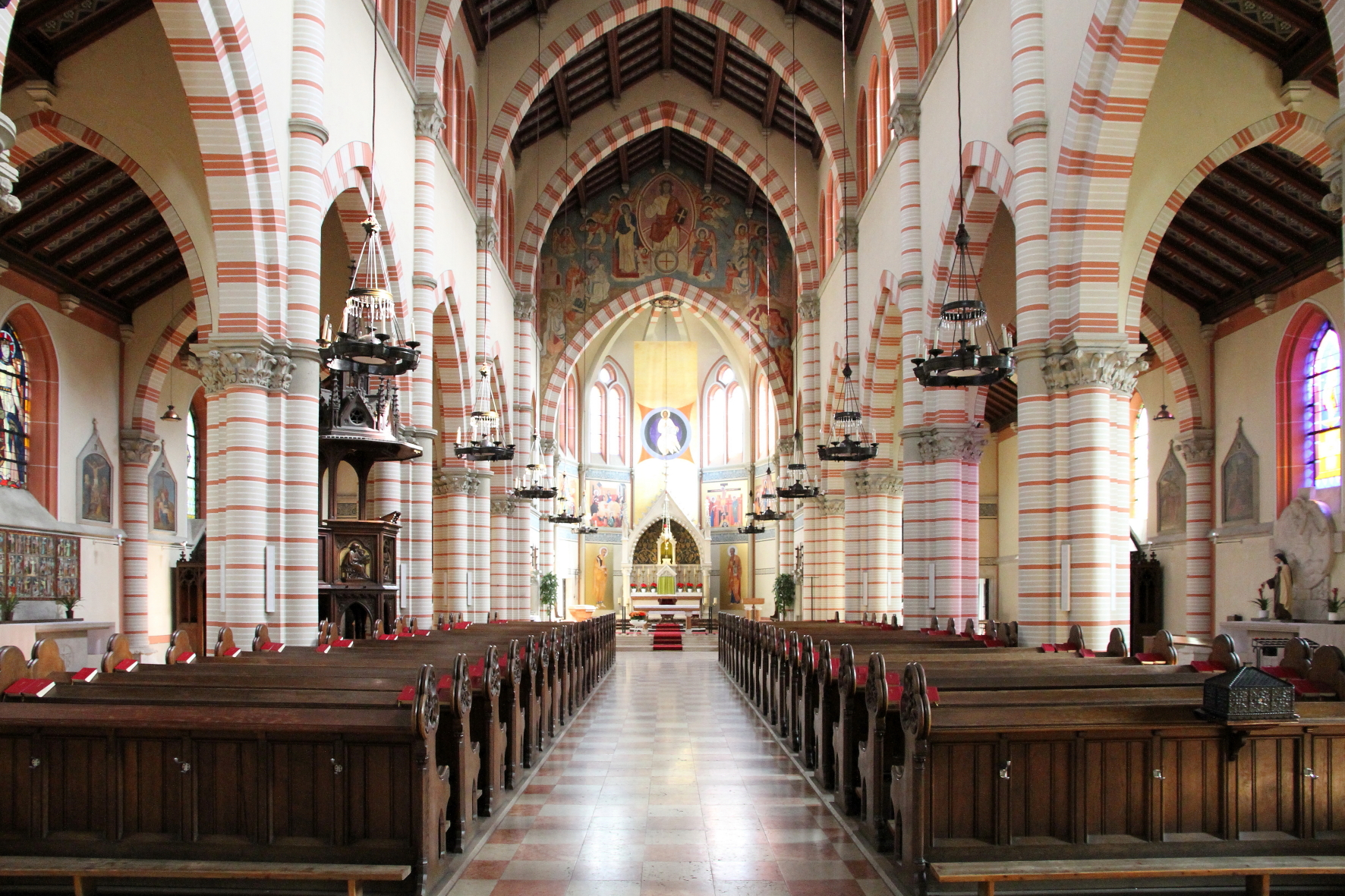 Innenansicht Richtung Altar der Brigittakirche im 20. Wiener Gemeindebezirk Brigittenau.